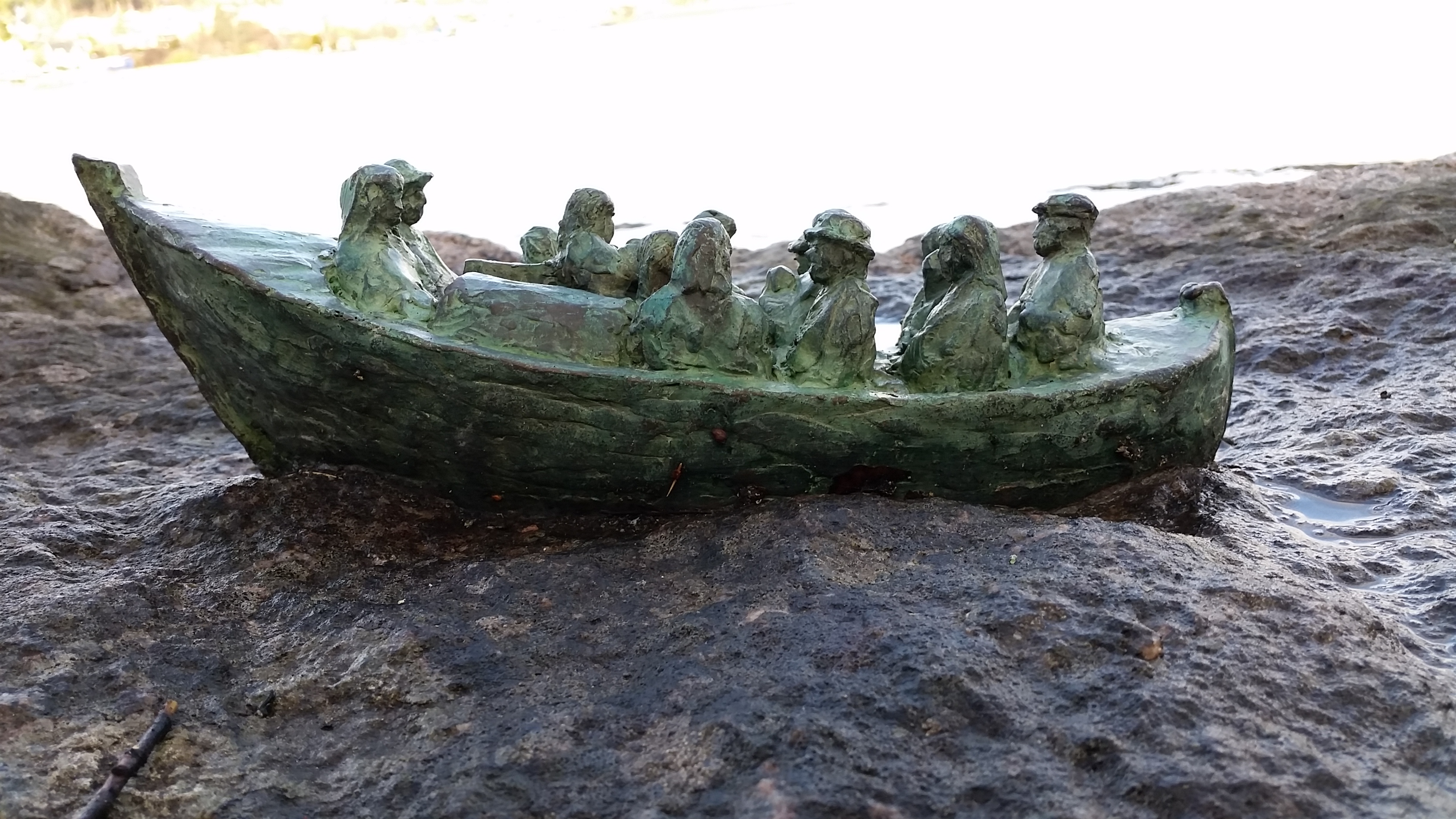 Minnesmärke över balternas flykt över Östersjön 1944 (2014) - Anders Jansson, Norrtälje This reproduction of an architectural work or work of art, is covered under the Swedish law of copyright for literary and artistic works (Law 1960:729, paragraph 24), which states that "Work of art may be depicted if it is permanently placed on or at a public place outdoors. Buildings may be freely depicted." See Commons:Freedom of panorama#Sweden for more information.